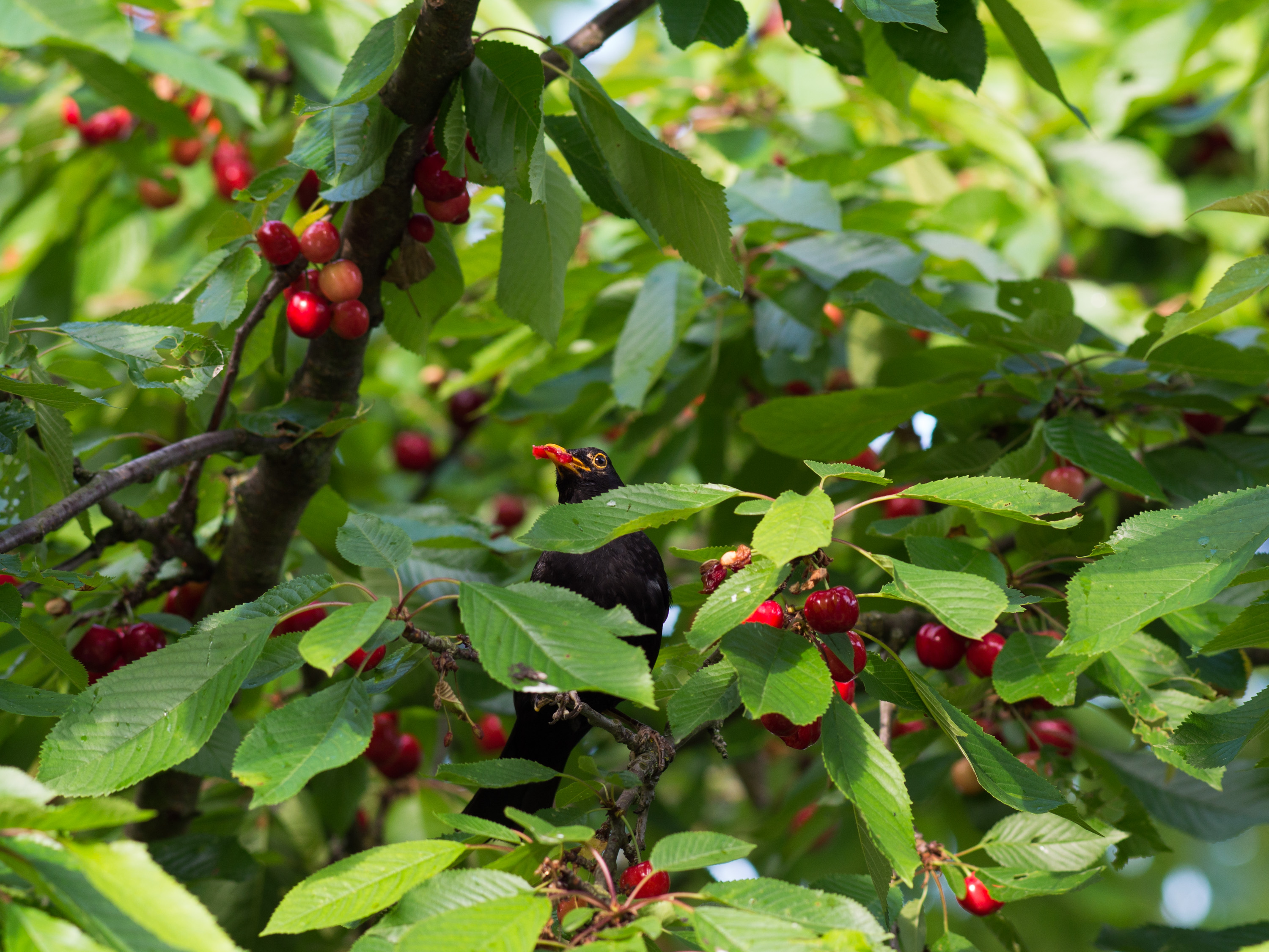 Im Kirschbaum sitzende Amsel frißt eine Kirsche